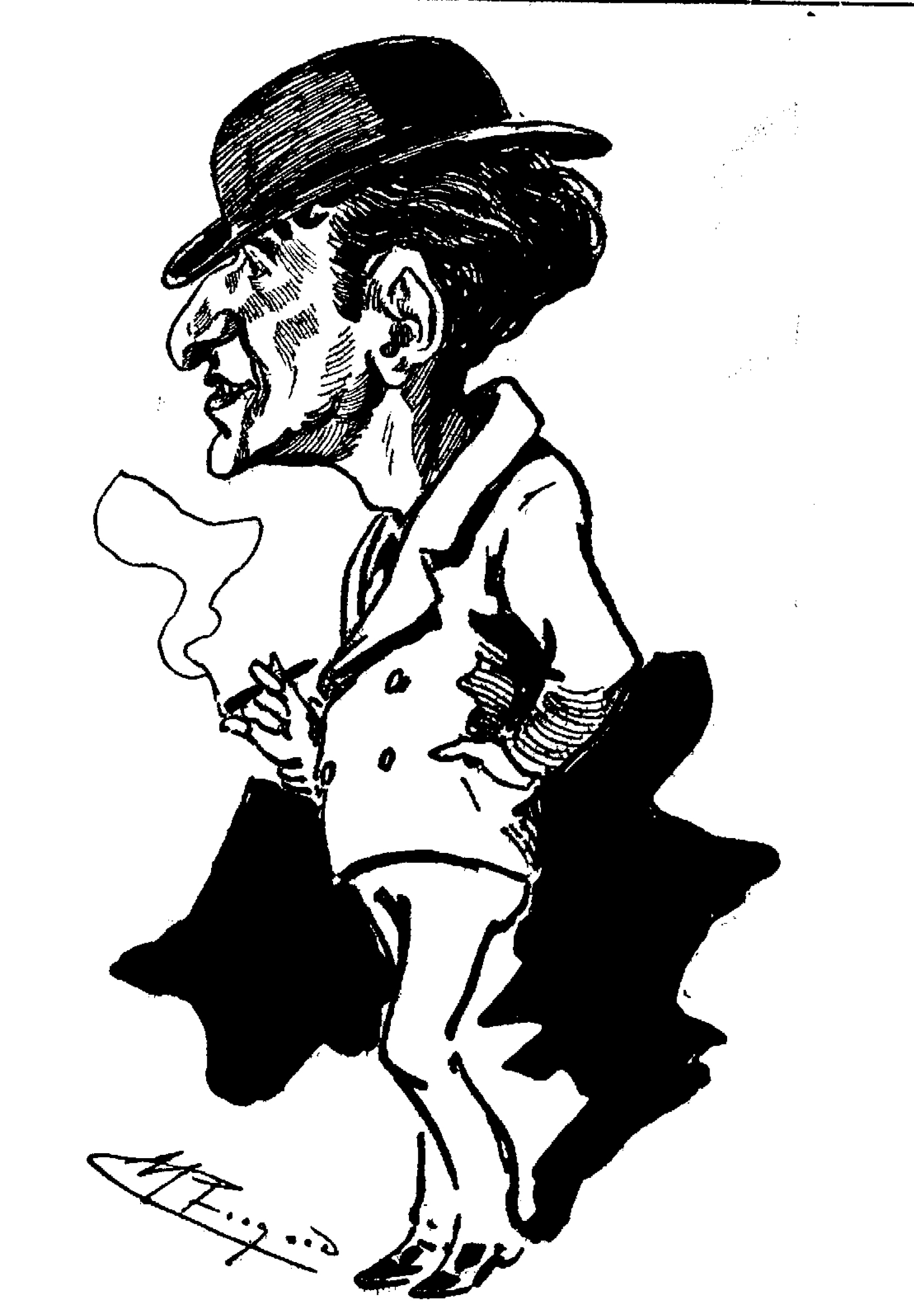 Ricardo Zamacois.